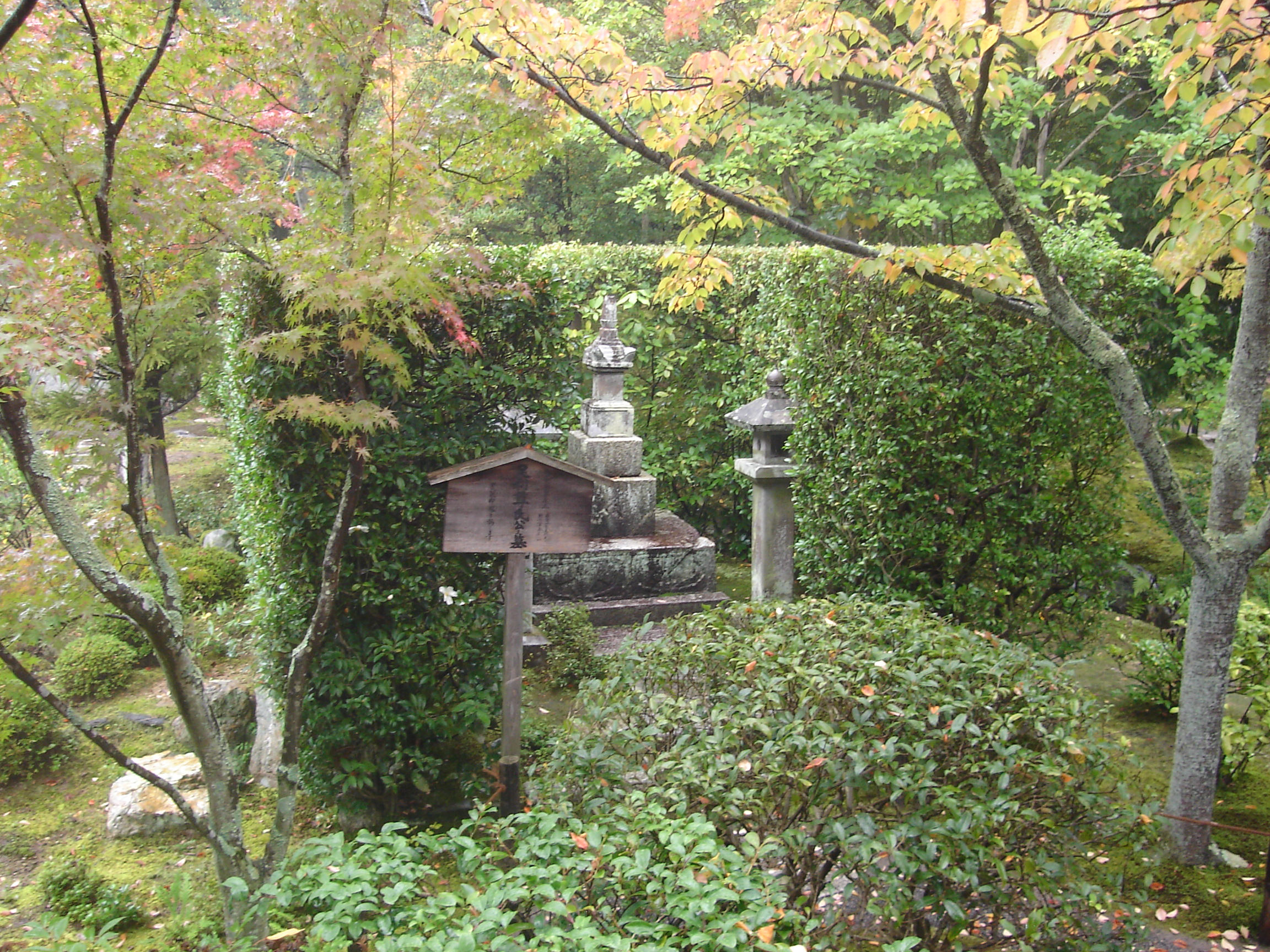 Tomb of Ashikaga Takauji in Toujiin kyoto japan